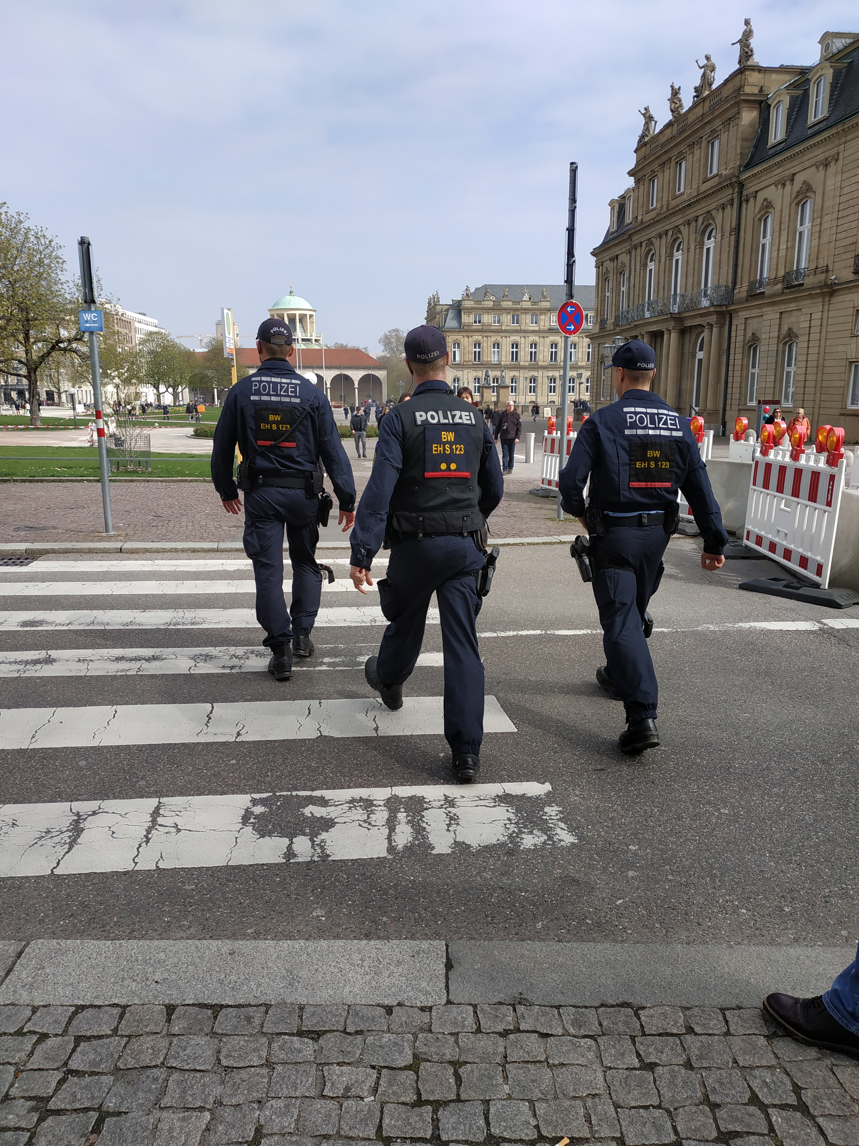 Officiers de la police anti-émeutes à Stuttgart